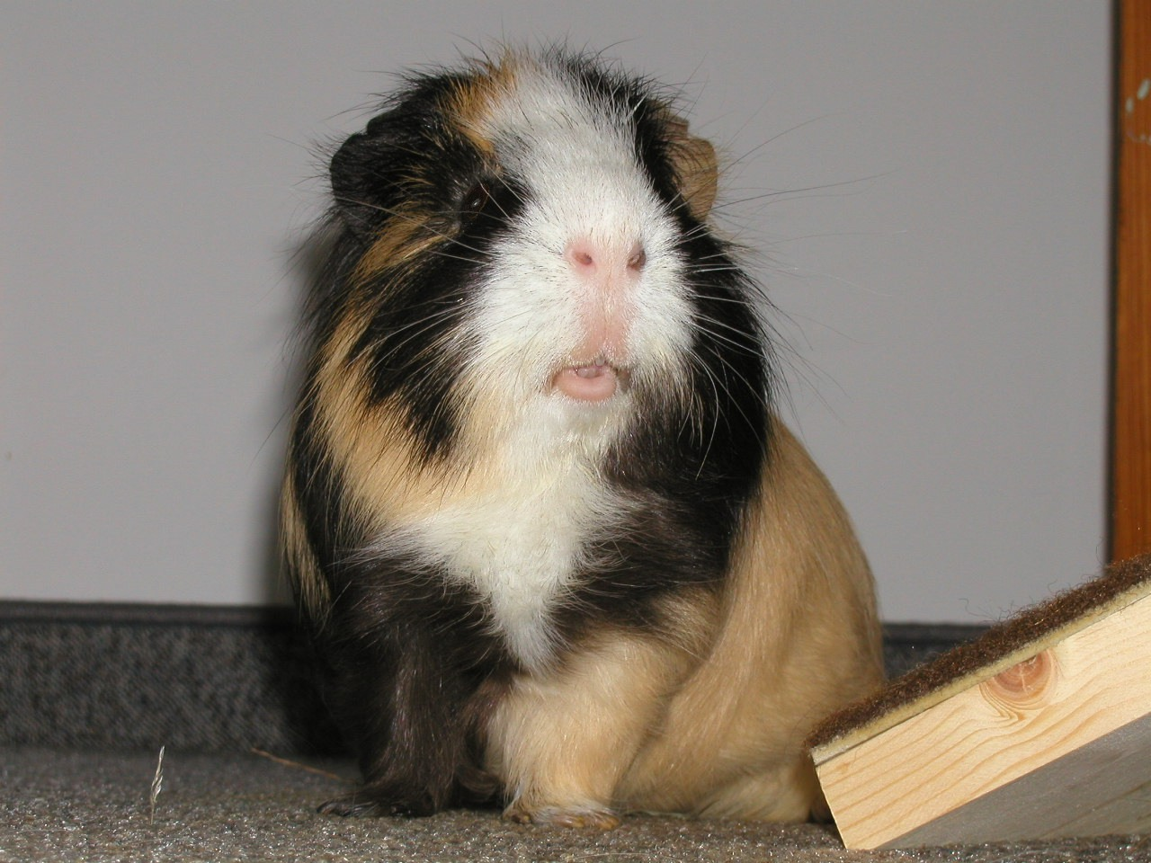 Hausmeerschweinchen (Cavia porcellus) Quelle: eigene Aufnahme am Dezember 2002 Fotograf: Roman Klementschitz (= Einer flog zu Weit), Wien